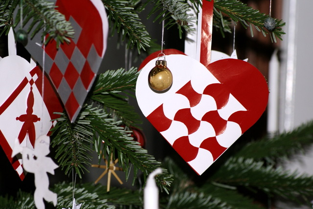 Billede af flettede julehjerter